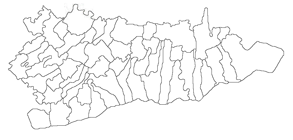 Categorie:Hărţi ale judeţului Călăraşi